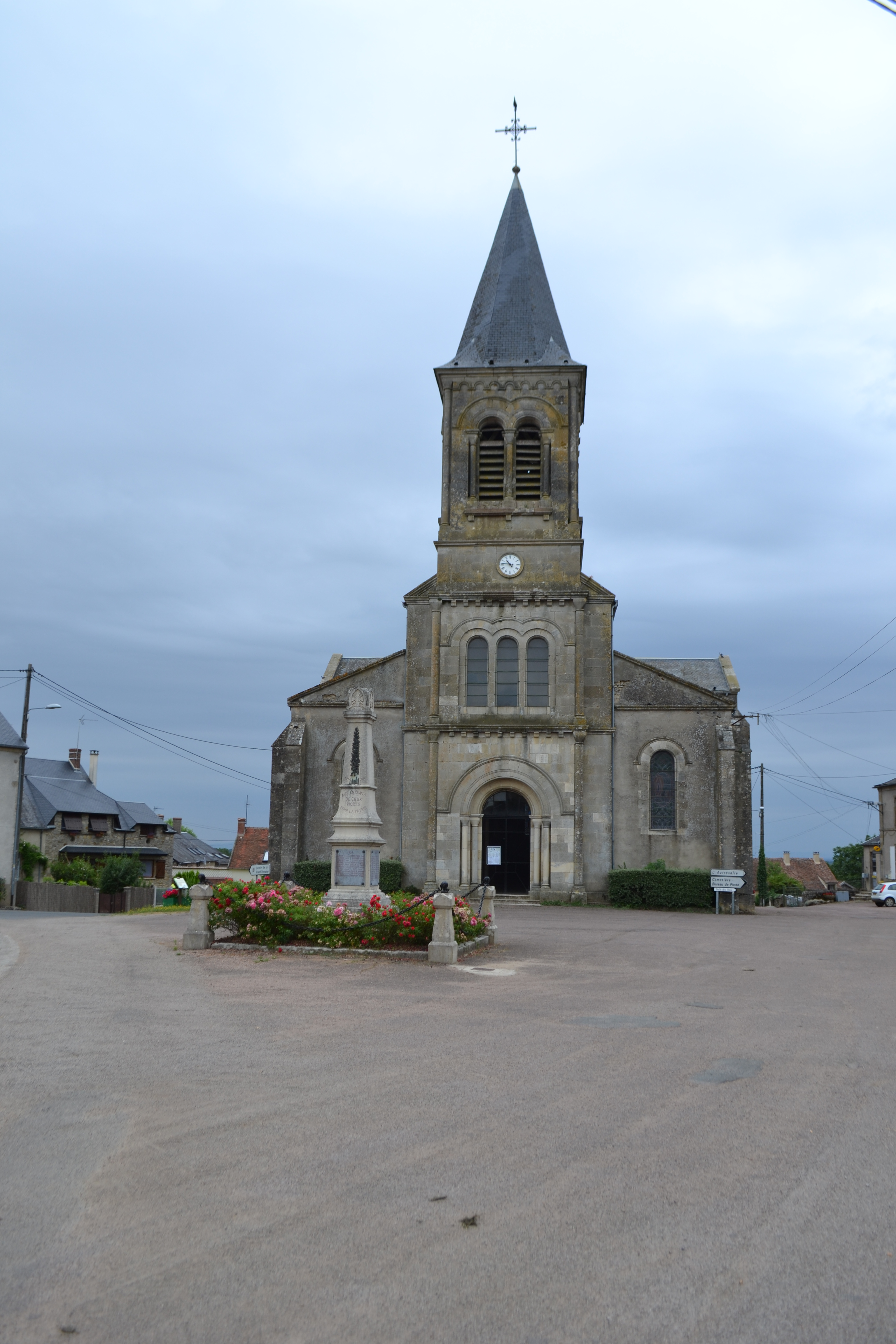 Eglise de Crux-la-Ville (Nièvre).